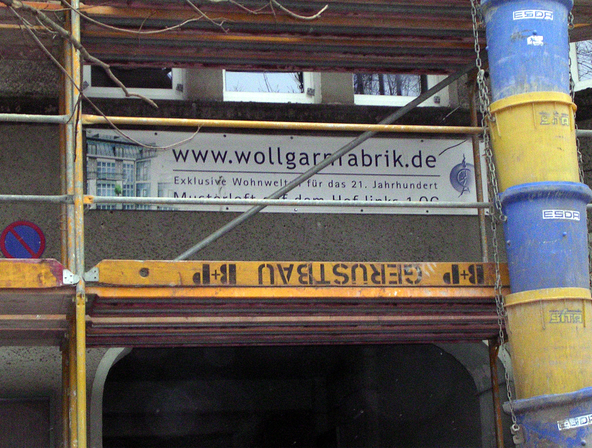 Eingang des Hauses Kadiner Straße 20 2004 mit dem Schild, das auf den Umbau der alten Wollgarnfabrik zu einem modernen Wohngebäude aufmerksam macht. Zu lesen ist: "Exklusive Wohnwelt für das 21. Jahrhundert" und etwas verdeckt "Musterloft auf dem Hof links 1. OG".